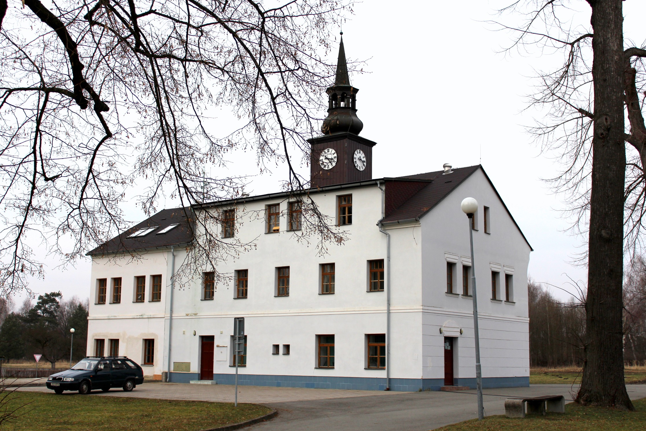 Obecní úřad Kuřívody